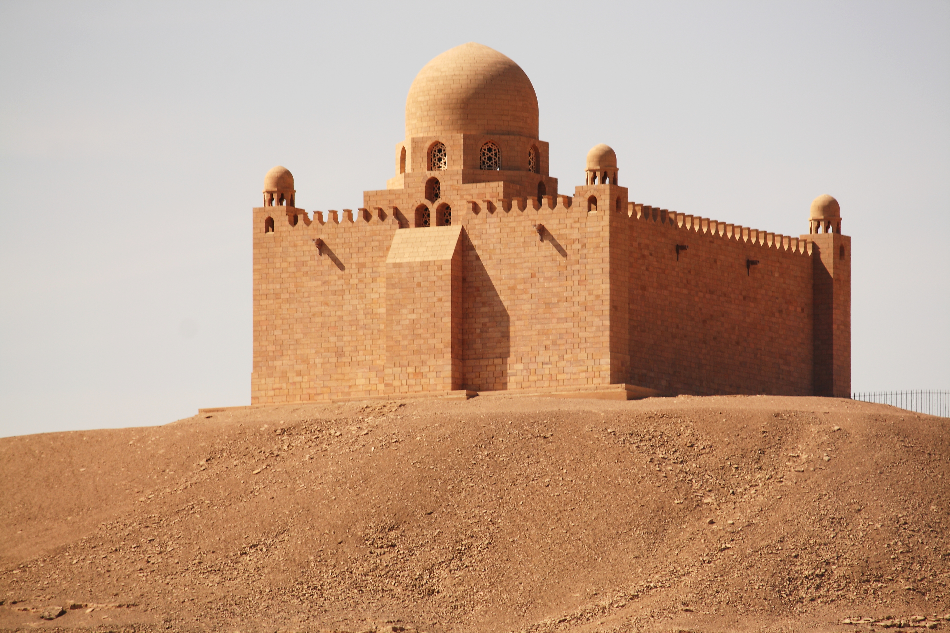 Bei Assuan, linkes Nilufer, Aga Khan Mausoleum